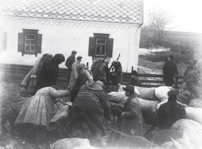 1934. Раскулачивание крестьянина П. Масюка в с. Удачное Донецкой области